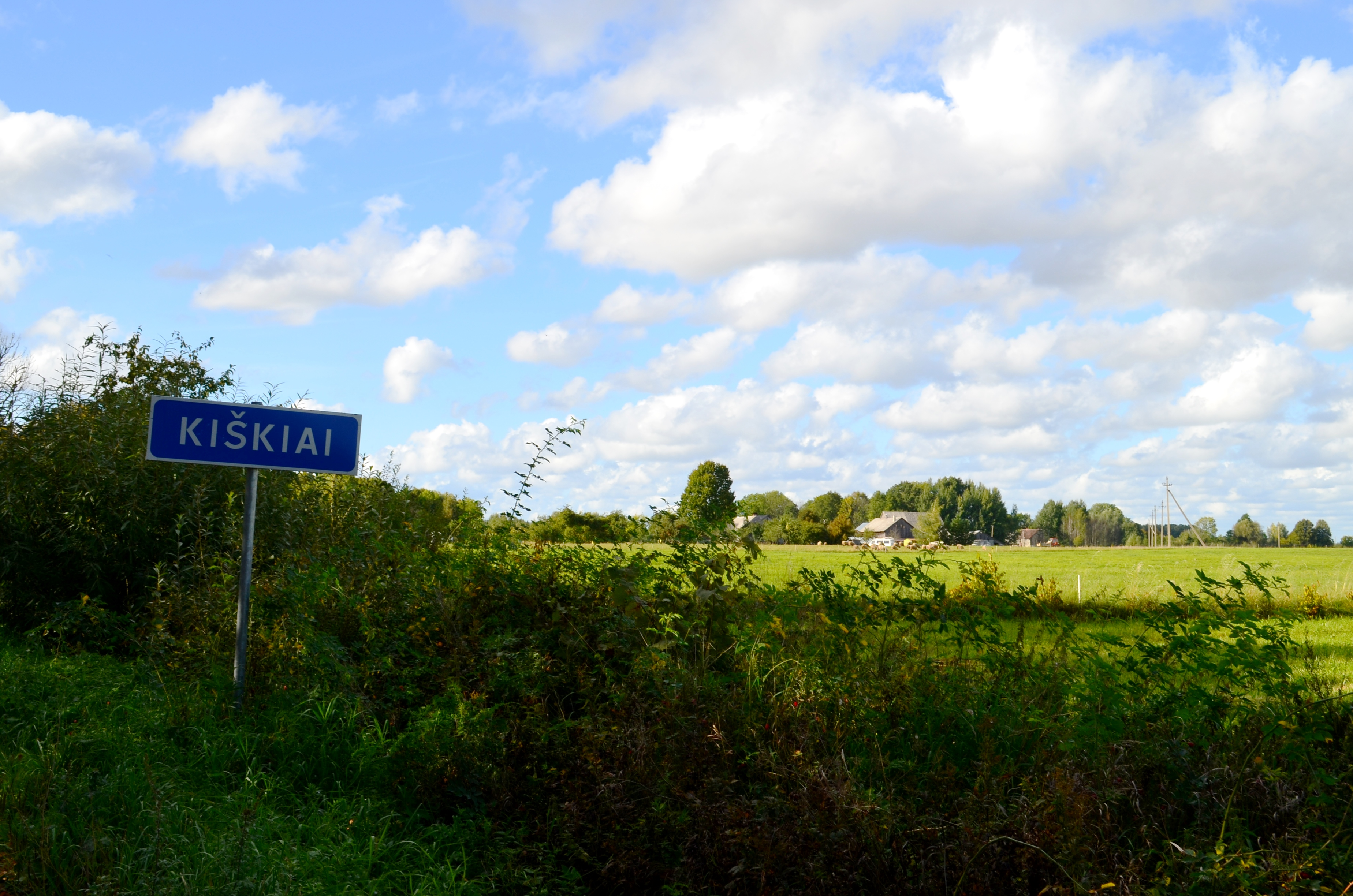 Kiškių k., Šilutės raj.